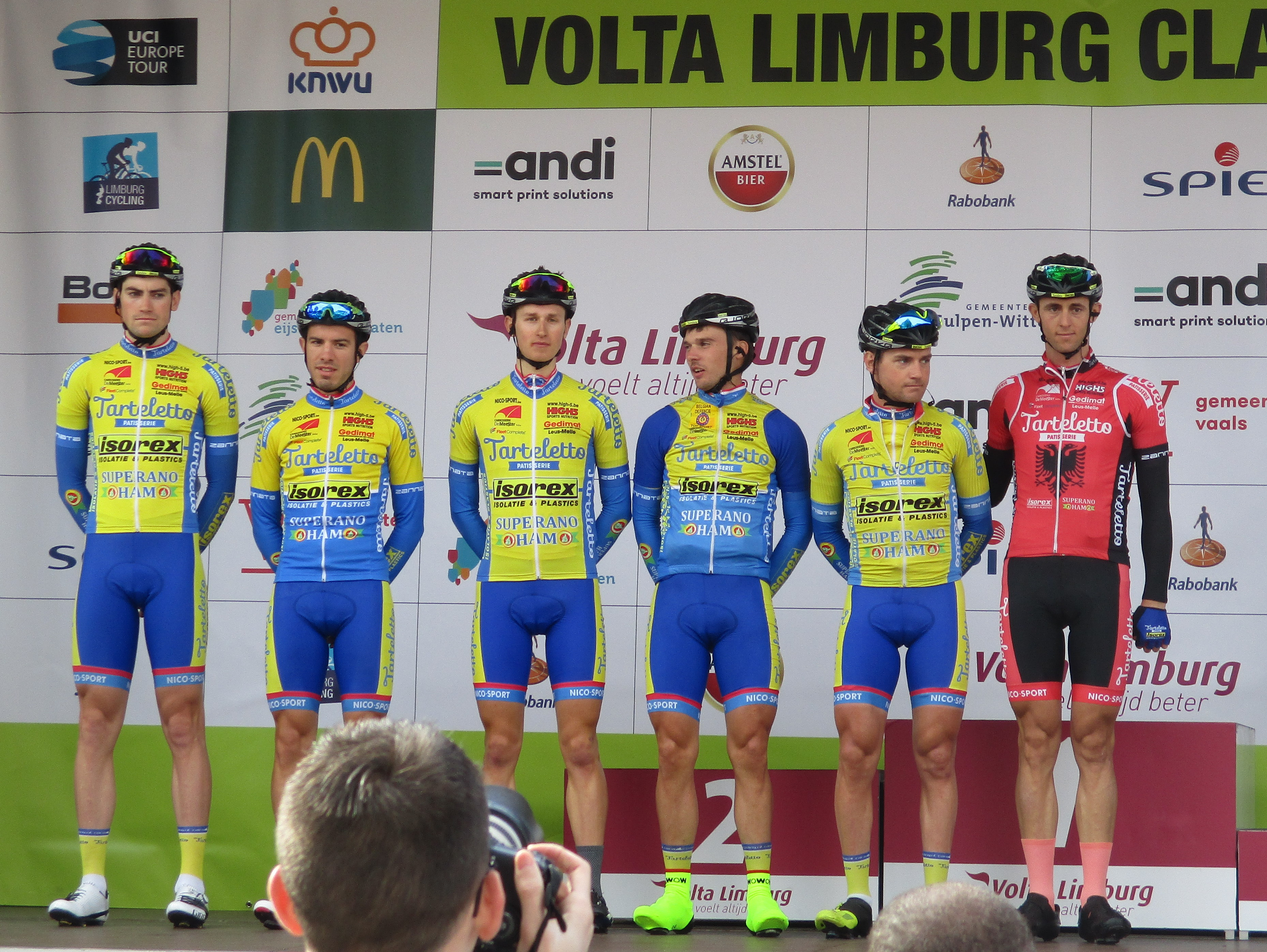 Start van de Volta Limburg Classic 2018 in de Diepstraat in Eijsden